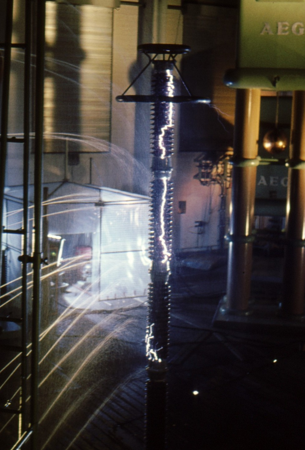 Hochspannungsentladung bei AEG in Kassel